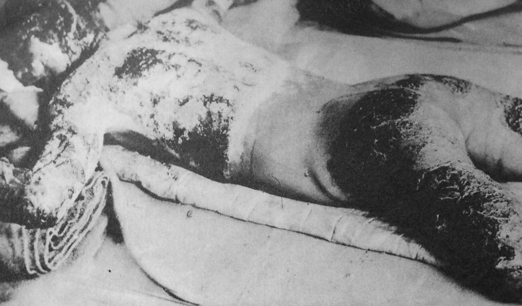 広島原爆の犠牲者